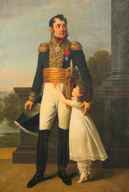 Le général Solignac et sa fille Caroline.